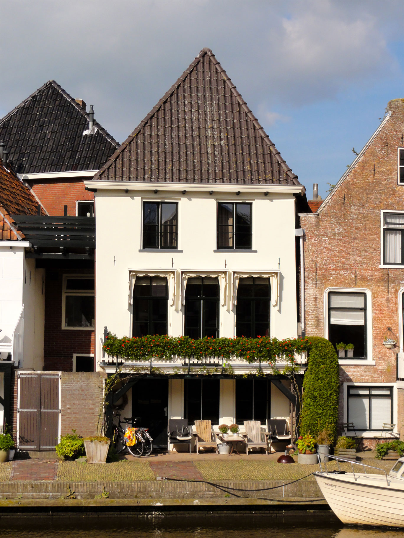 Achtergevel Nauwstraat 15 Dokkum, rijksmonument